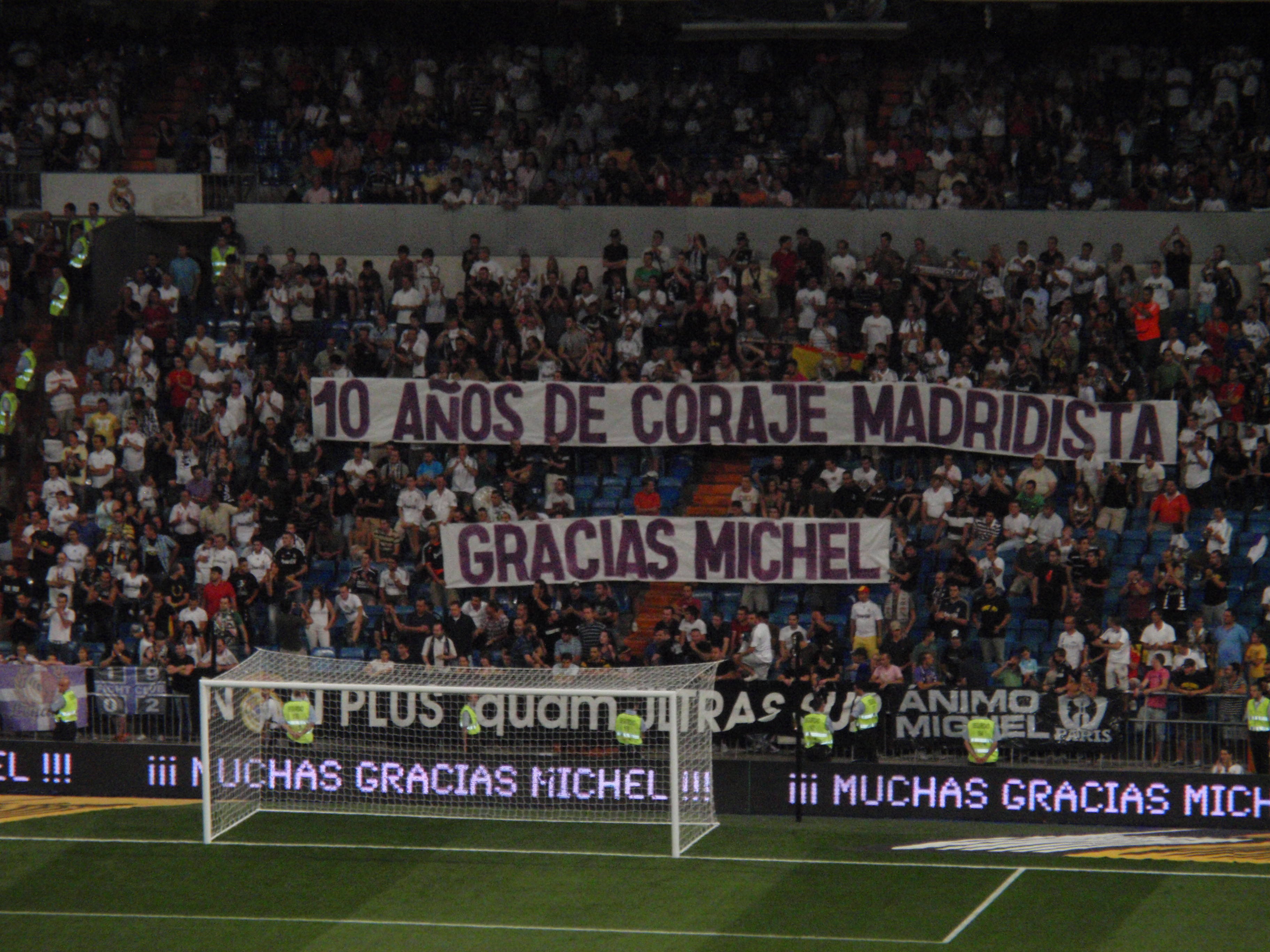 Homenaje a Míchel Salgado por parte del grupo Ultras Sur, también secundado por el resto del público del estadio Santiago Bernabéu, antes de dar comienzo el partido Real Madrid - Rosenborg, correspondiente al XXXI Trofeo Santiago Bernabéu.